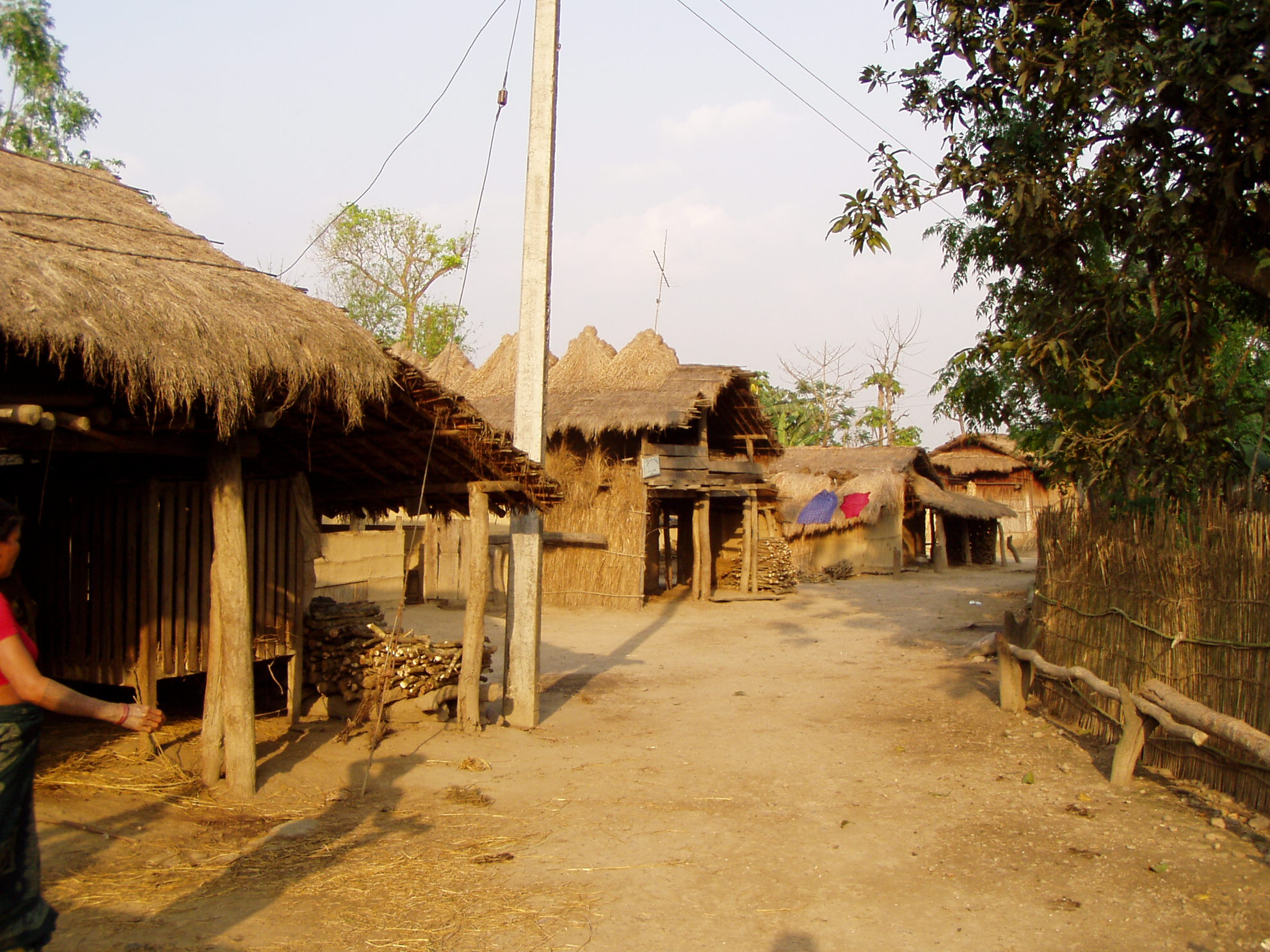 Tharu village at Sauraha (Nepal)